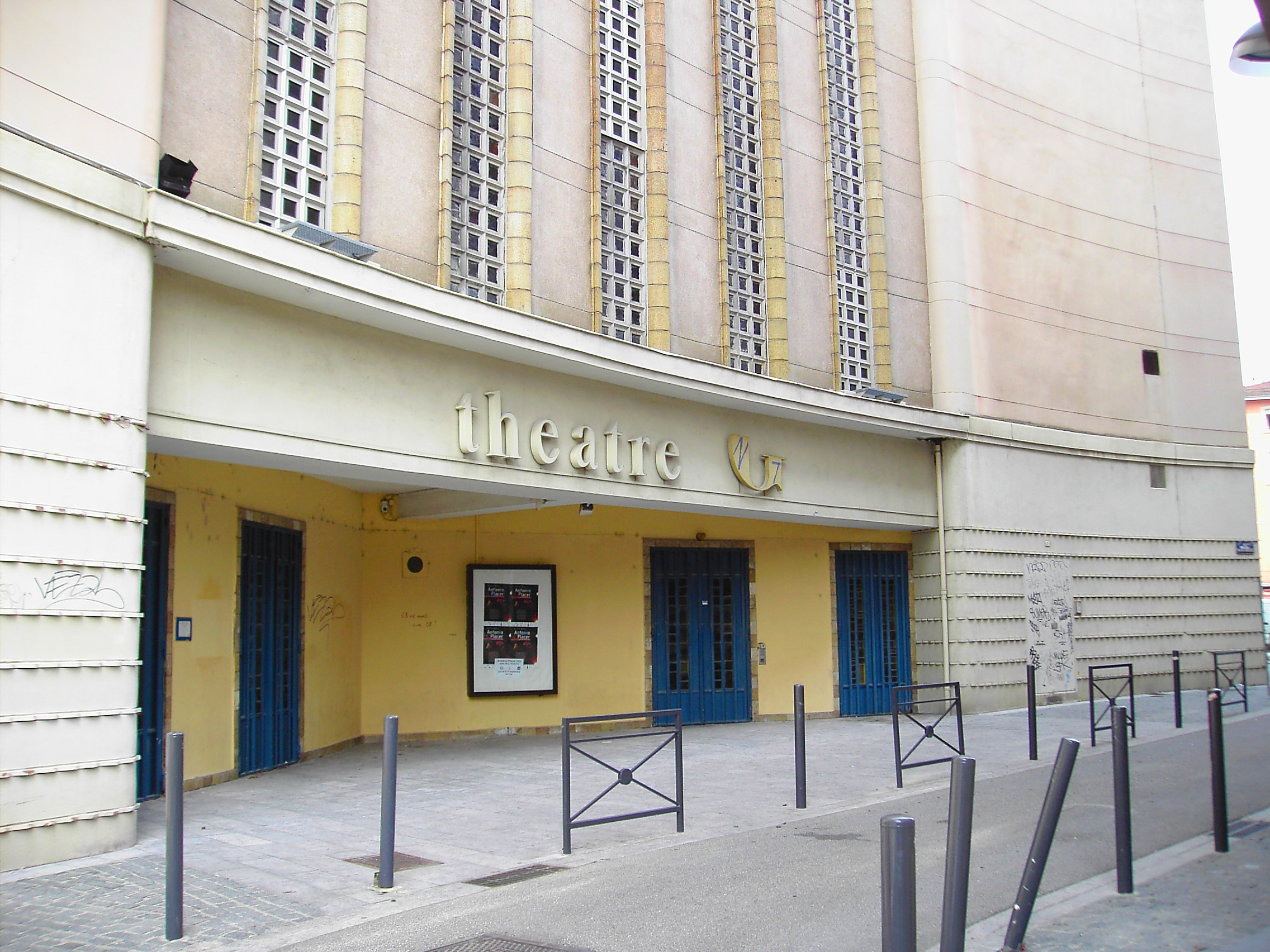 Entrée Théâtre Municipal de Grenoble